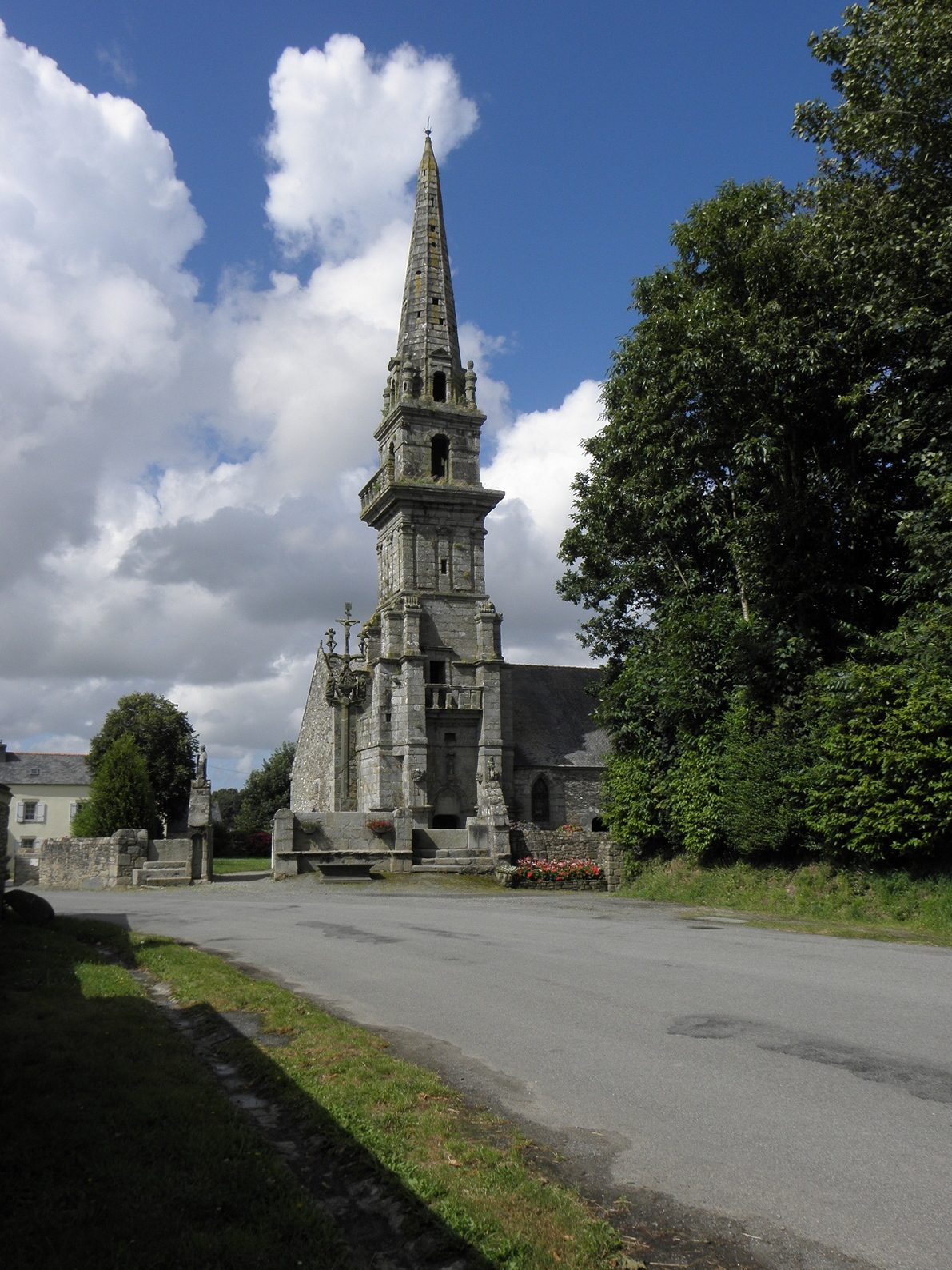 Vue méridionale de la chapelle de Loc-Maria-Lann en Plabennec (29).